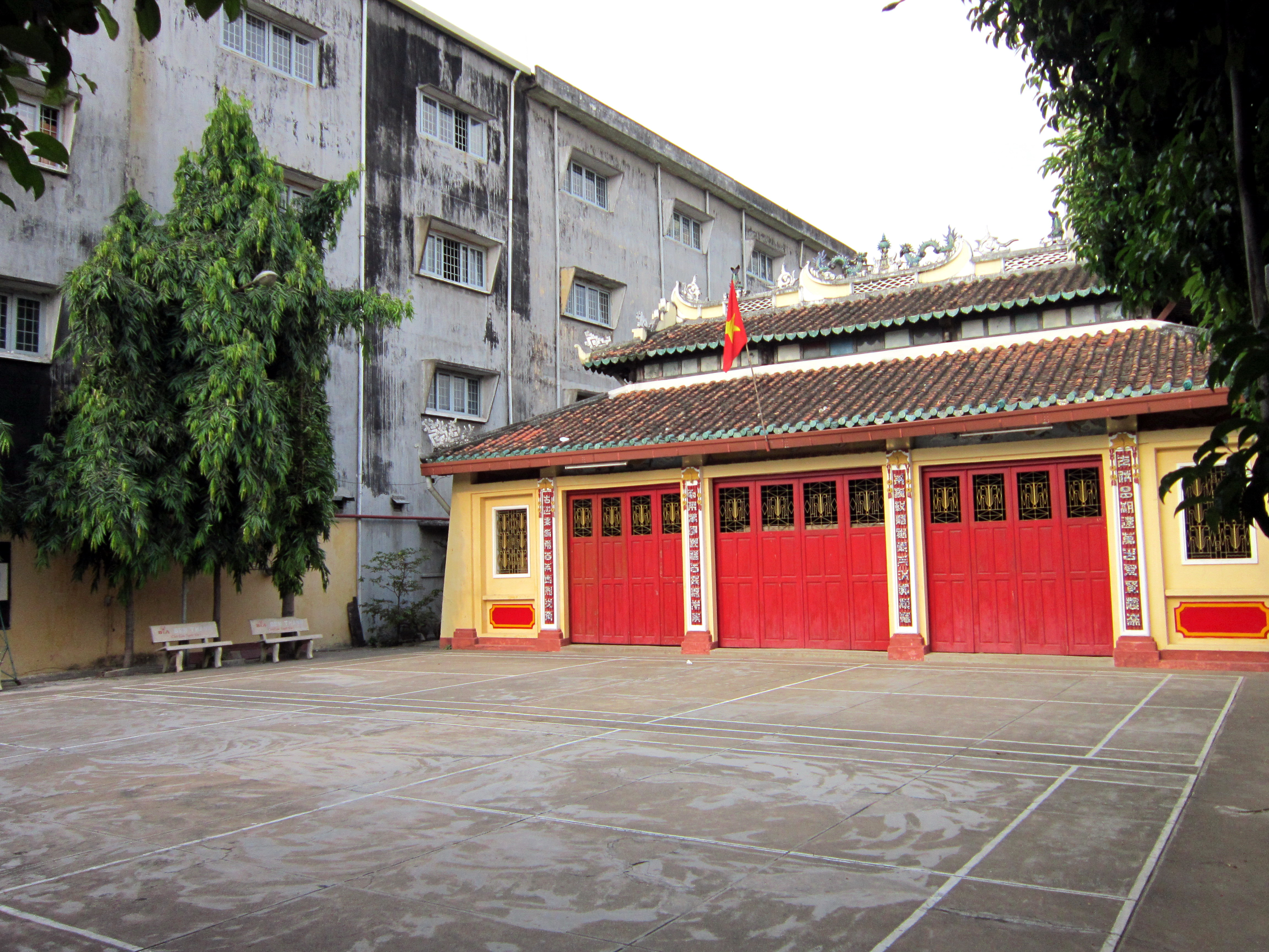 Đình Bình Hòa là một ngôi đình cổ, hiện tọa lạc ở số 15/77 đường Chu Văn An, thuộc phường 12, quận Bình Thạnh, Thành phố Hồ Chí Minh, Việt Nam.